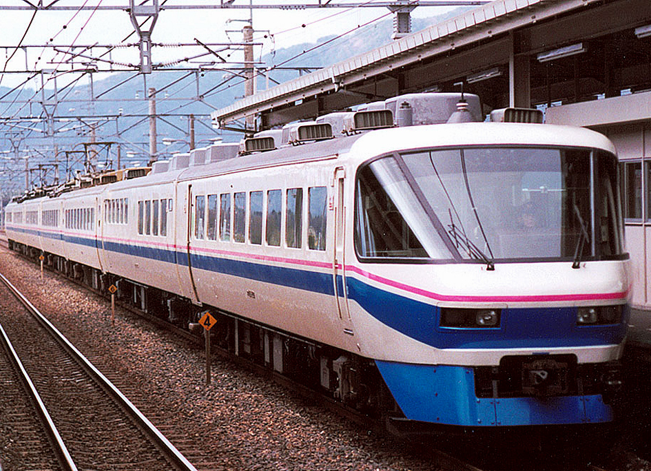 JR西日本 485系特急形電車 特急「スーパー雷鳥」（登場時）